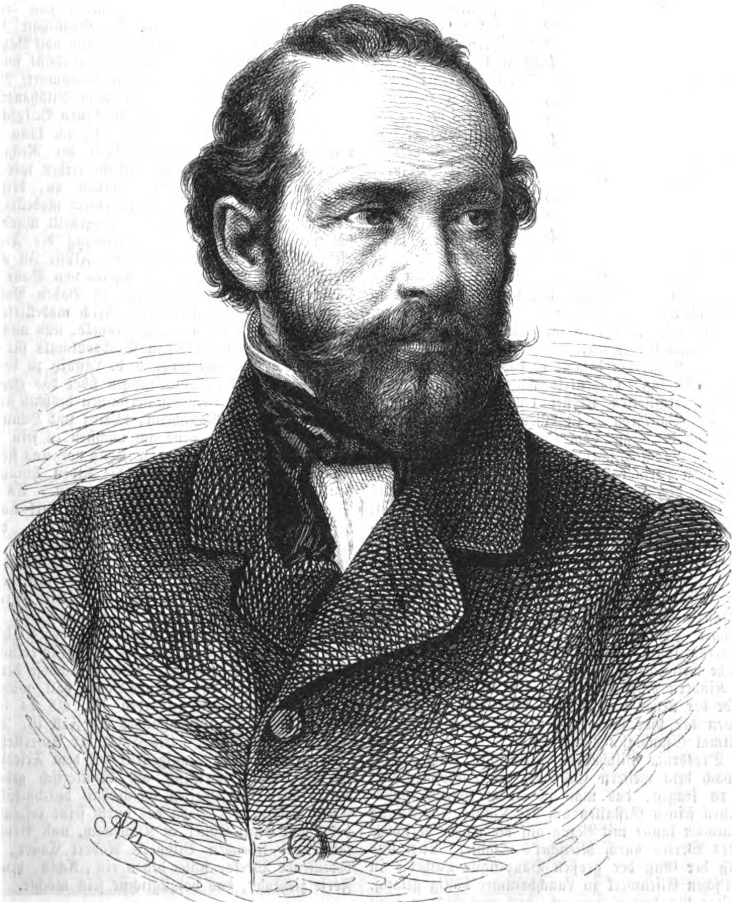 Julius Schrader, deutscher Maler im 19. Jh.